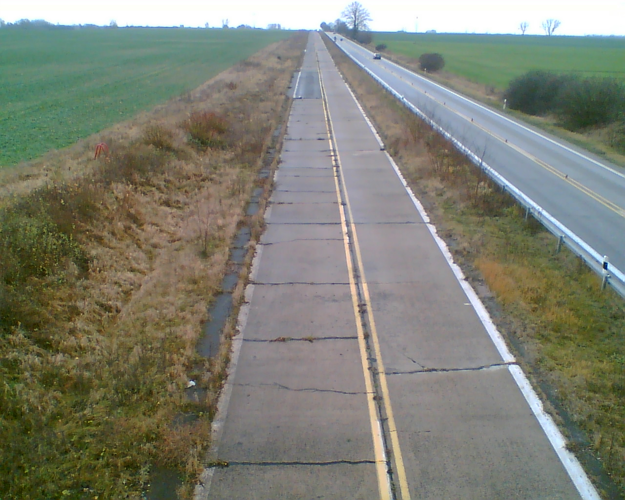 Autobahn A11; km 99,1; desolater Fahrbahnzustand Südfahrbahn